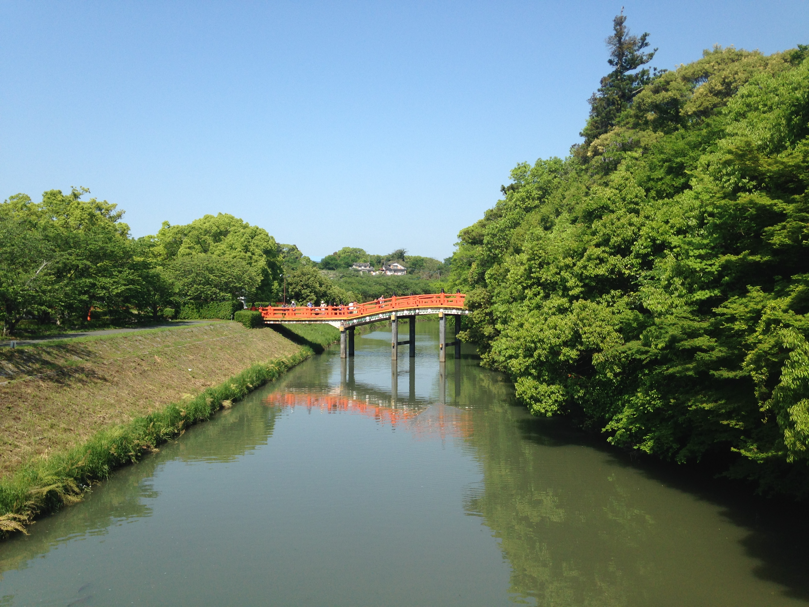 宇佐神宮・仲見世付近の神橋より望む寄藻川(下流側)